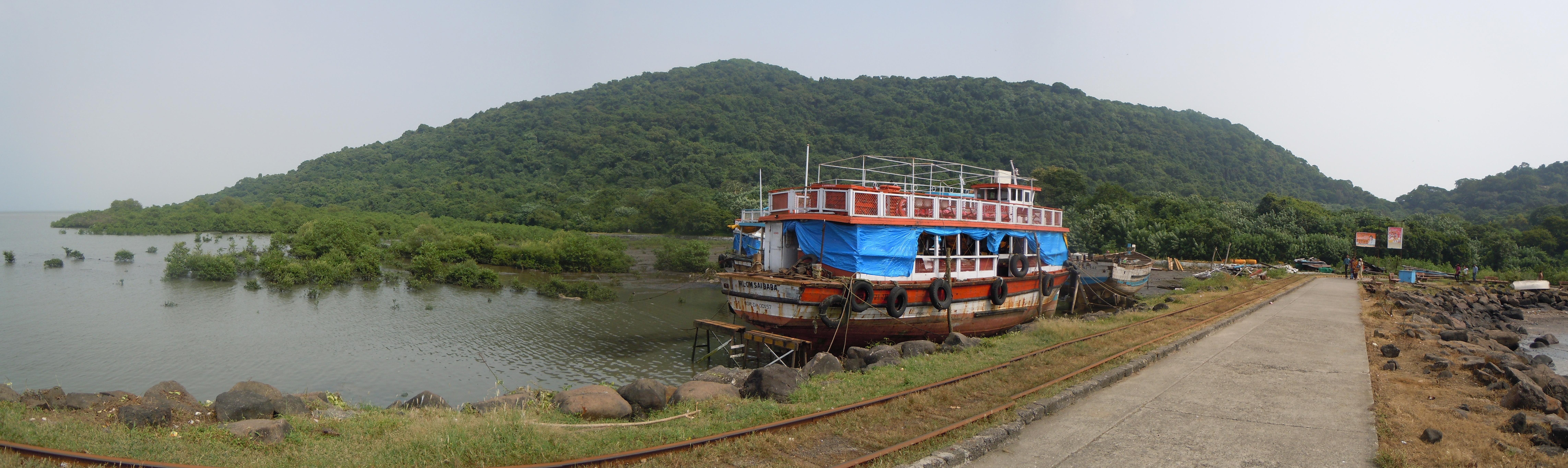 Ile d'Eléphanta - Mumbai - Réparation des bateaux - quai d'acès à l'île.